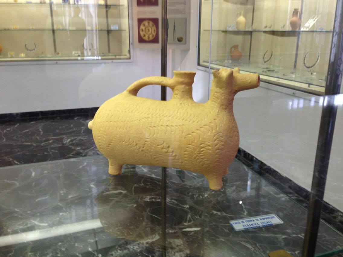 the wonderful vase in MaMe